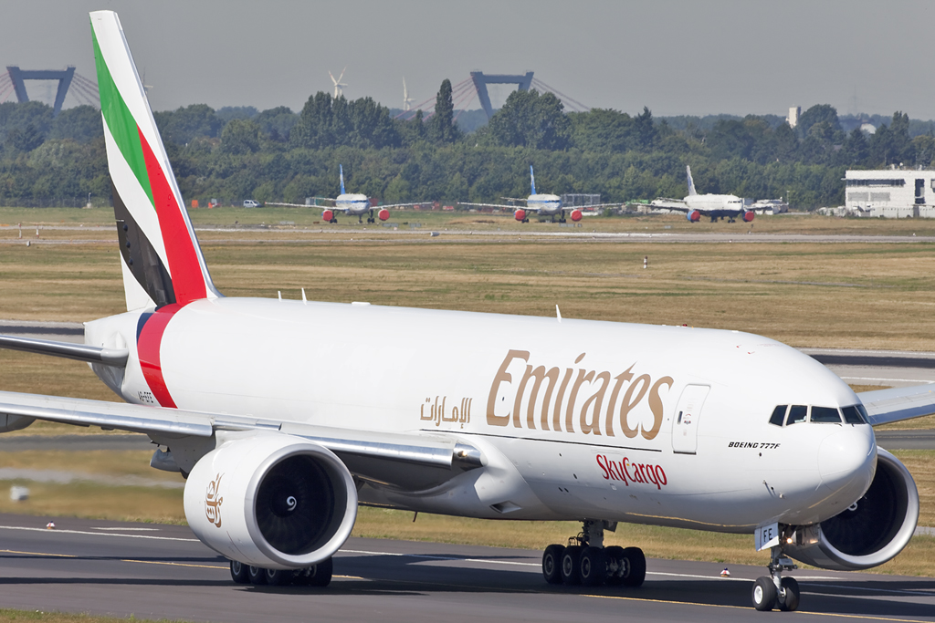 Dusseldorf